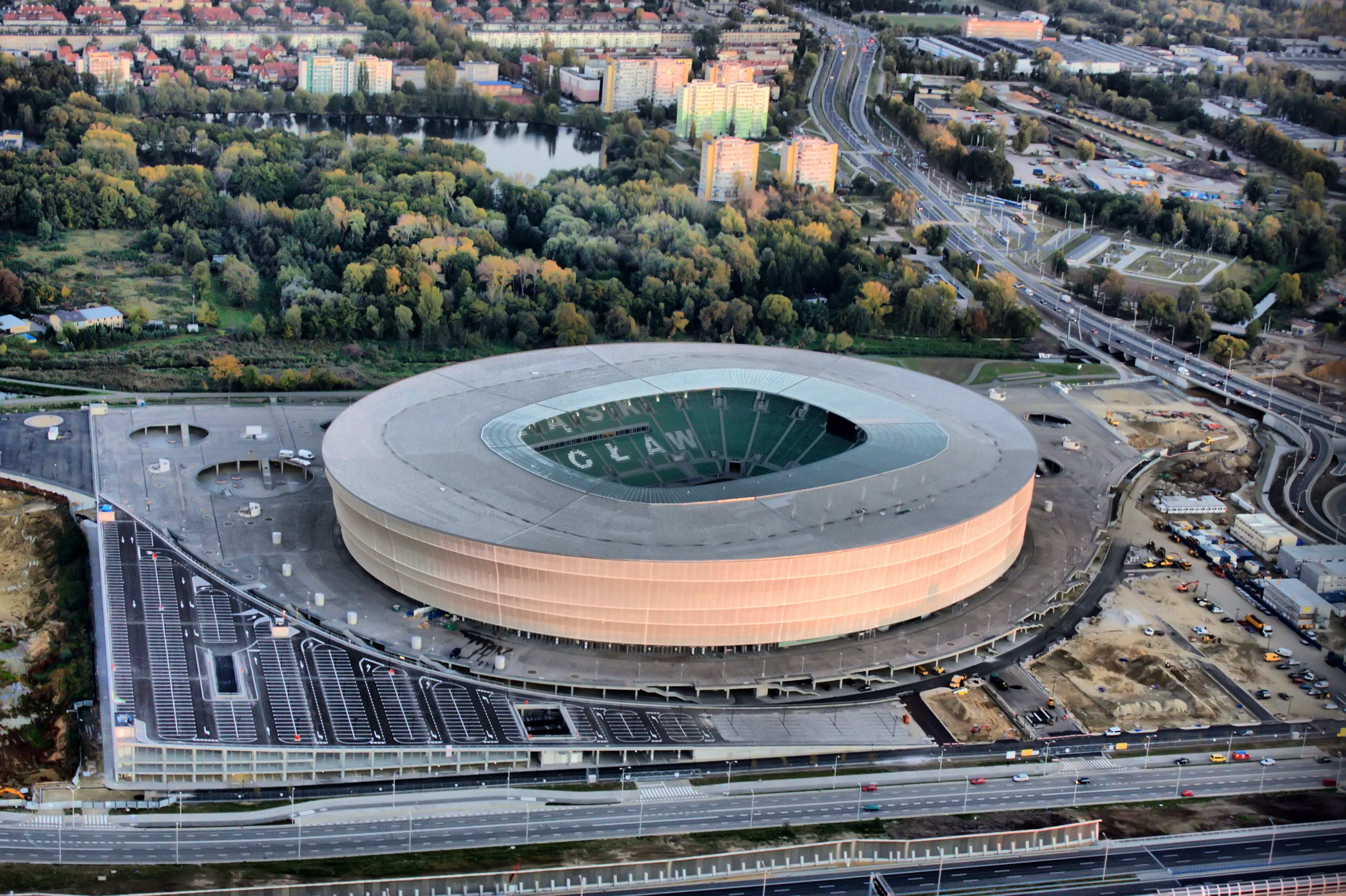 Stadion we Wroclawiu z lotu ptaka